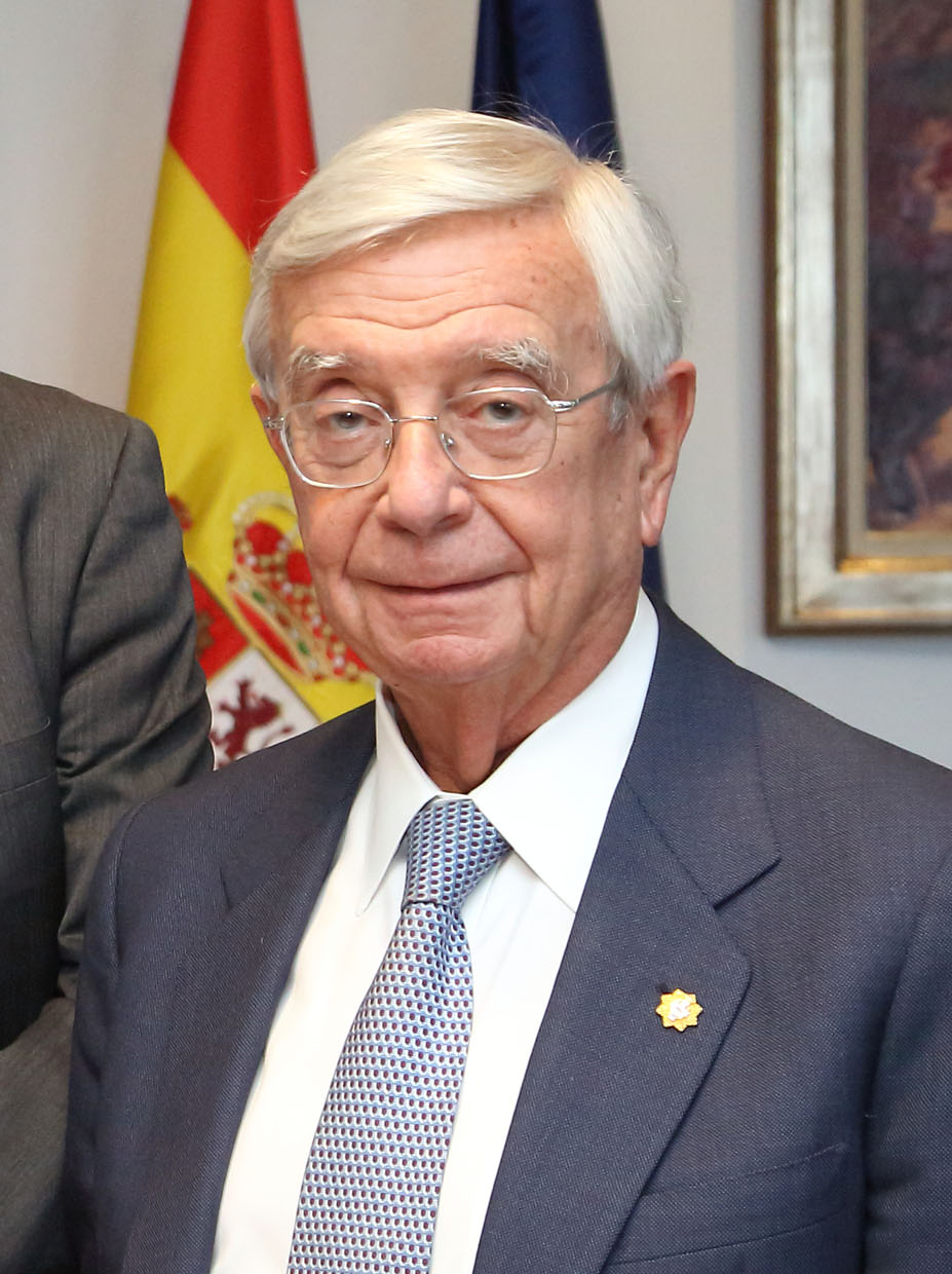 Toledo, 28 de febrero de 2019.- El consejero de Agricultura, Medio Ambiente y Desarrollo Rural, Francisco Martínez Arroyo, durante la reunión que ha mantenido hoy en la Consejería con el presidente de la Real Academia de Gastronomía de España, Rafael Ansón (d) y con el presidente de la Academia de la Cultura Gastronómica de Castilla-La Mancha, José Antonio Mateos (i). (Foto: Álvaro Ruiz // JCCM)